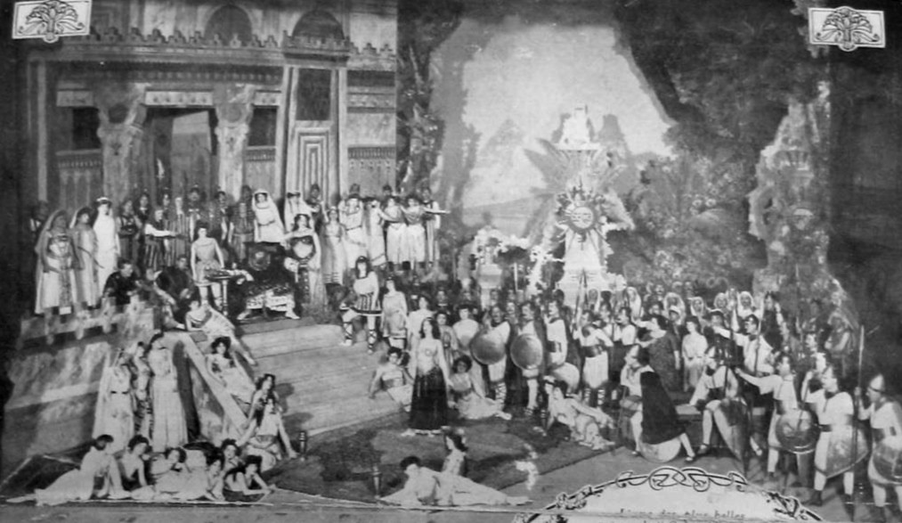 Mariotte - Salomé - Bioletto - L'Une de plus belles scènes de 'Salomé' Massilia 3, no. 64 (15 November 1910), p.9